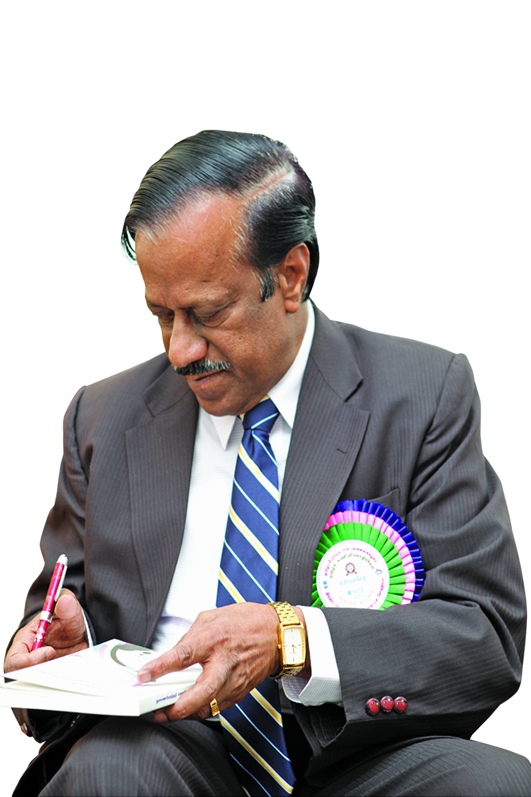 தமிழ் இணையப் பல்கலைக் கழகம், பாதரிதாசன் பல்கலைக் கழகம் ஆகியவற்றில் துணைவேந்தராகப் பணியாற்றியவர். எஸ் ஆர் எம் பல்கலைக் கழகத்தின் துணைவேந்தர், தனித்தமிழ்ப் பற்றாளர். தொண்டர். Vice chancellor of Tamil virtual University, Bharathidasan University, S R M University